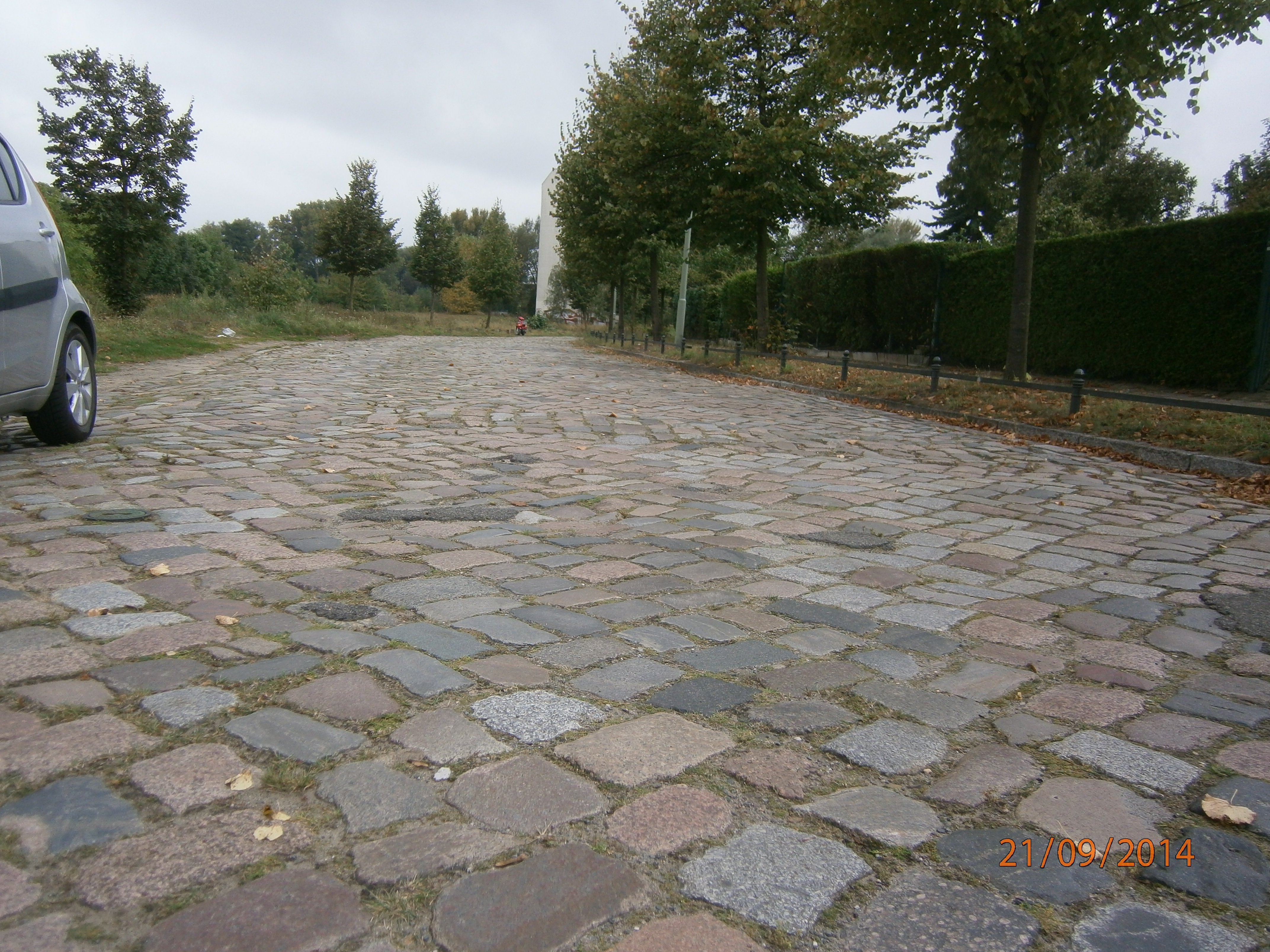 Der Nonnendamm ist eine Straße im Berliner Ortsteil Charlottenburg-Nord und in seiner Länge auch im Ortsteil Siemensstadt und Charlottenburg. Es ist das verbliebene Reststück an der Spree einer historischen Straße zwischen Magdeburg und Polen. Im Bild der Blick über den Straßenbelag, im Hintergrund das Künstlerhaus Nonnendamm 17/19, vormals Chemische Fabrik Urban & Lemm.